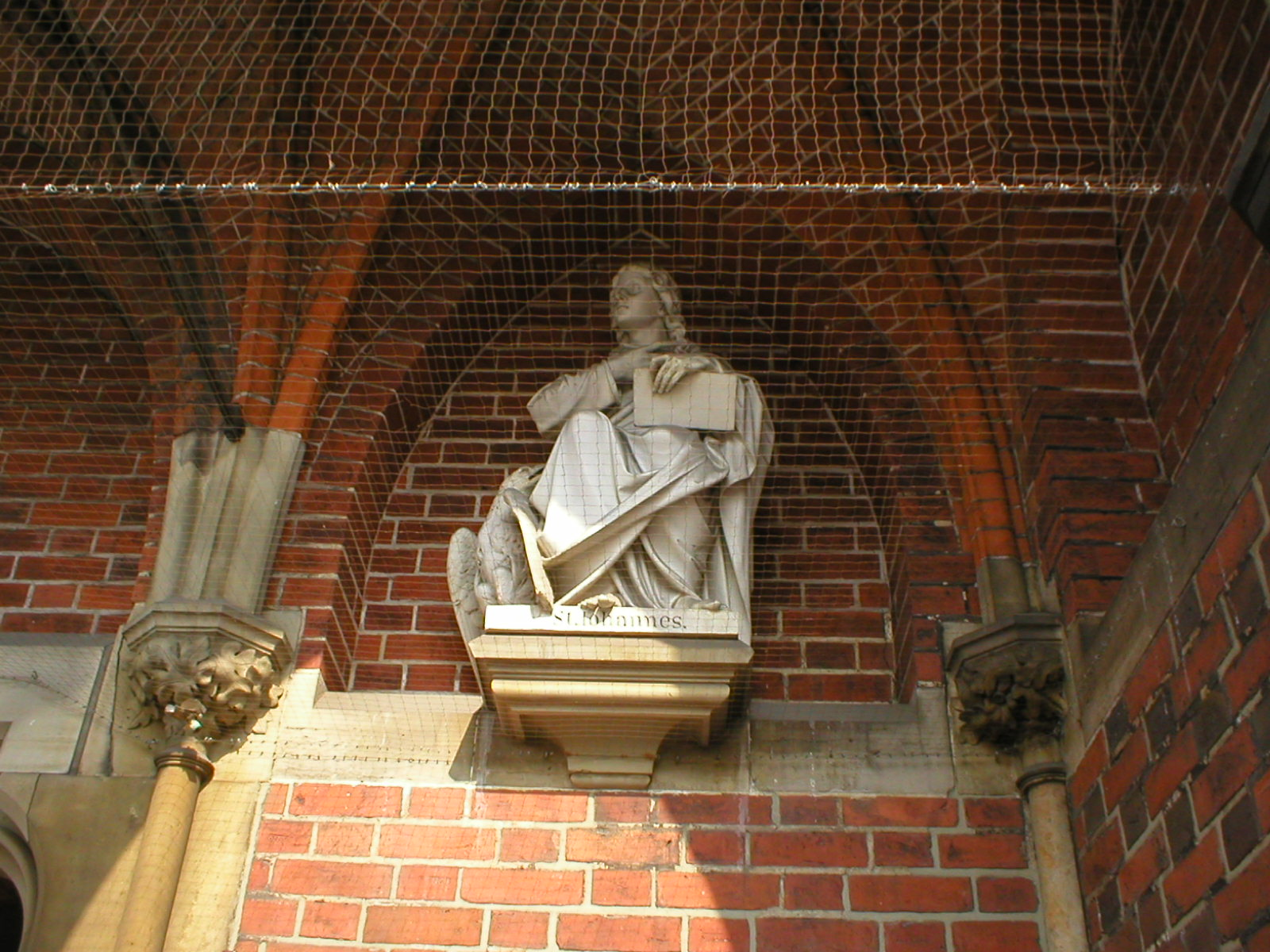 St. Johannes mit dem Adler, 1888 geschaffene Skulptur von August Herzig in der Eingangshalle der Südseite der Petrikirche in Hamburg-Altstadt.This is a photograph of an architectural monument.